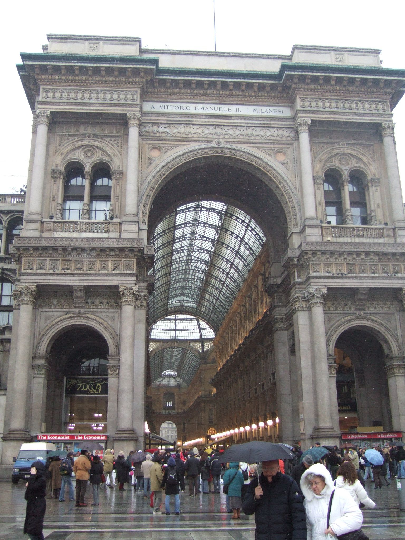 Mila (Italia)